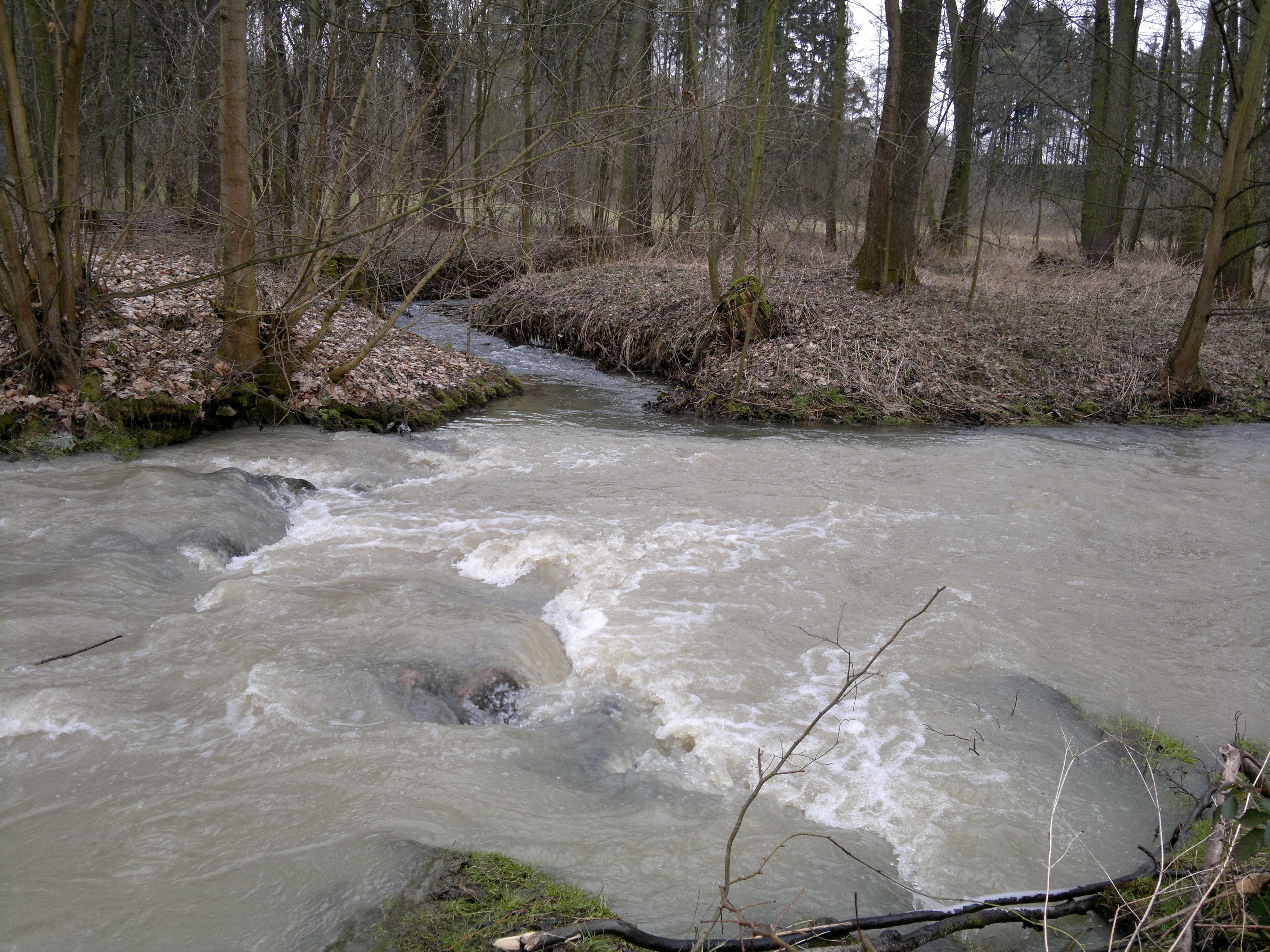 Ústí Výrovky do Hostačovky v okrese Kutná Hora